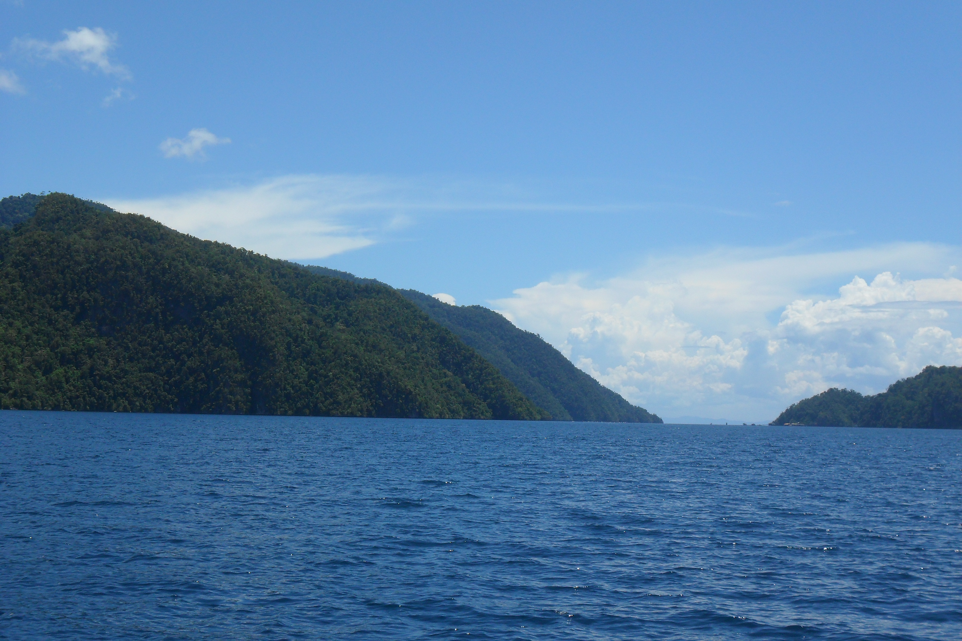 BOINAGA